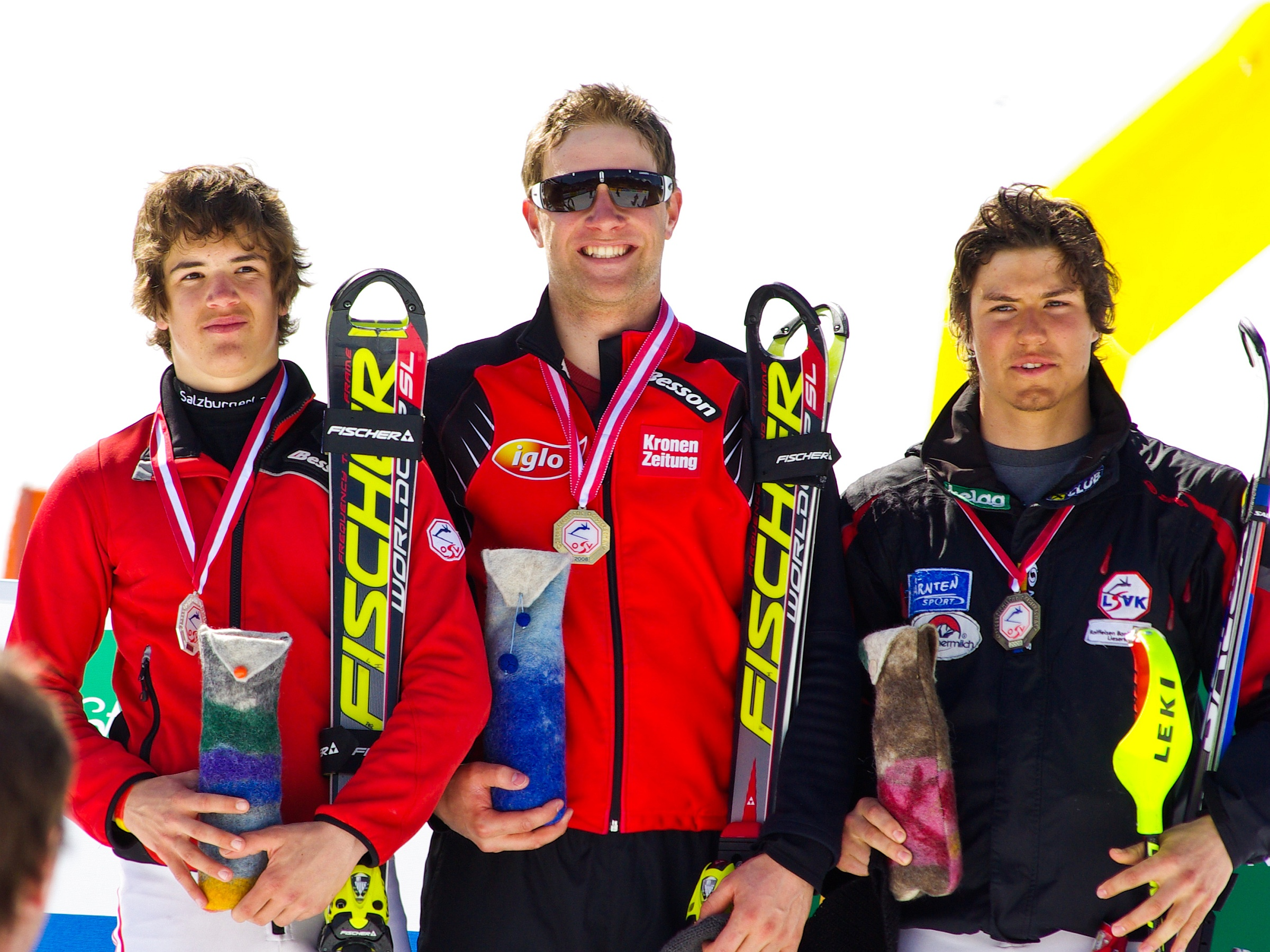 Die Sieger der Kombination der Österreichischen Alpinen Skimeisterschaften 2008: 1. Platz: Romed Baumann (mitte), 2. Platz: Roland Leitinger (links), 3. Platz: Christopher Krabath (rechts)